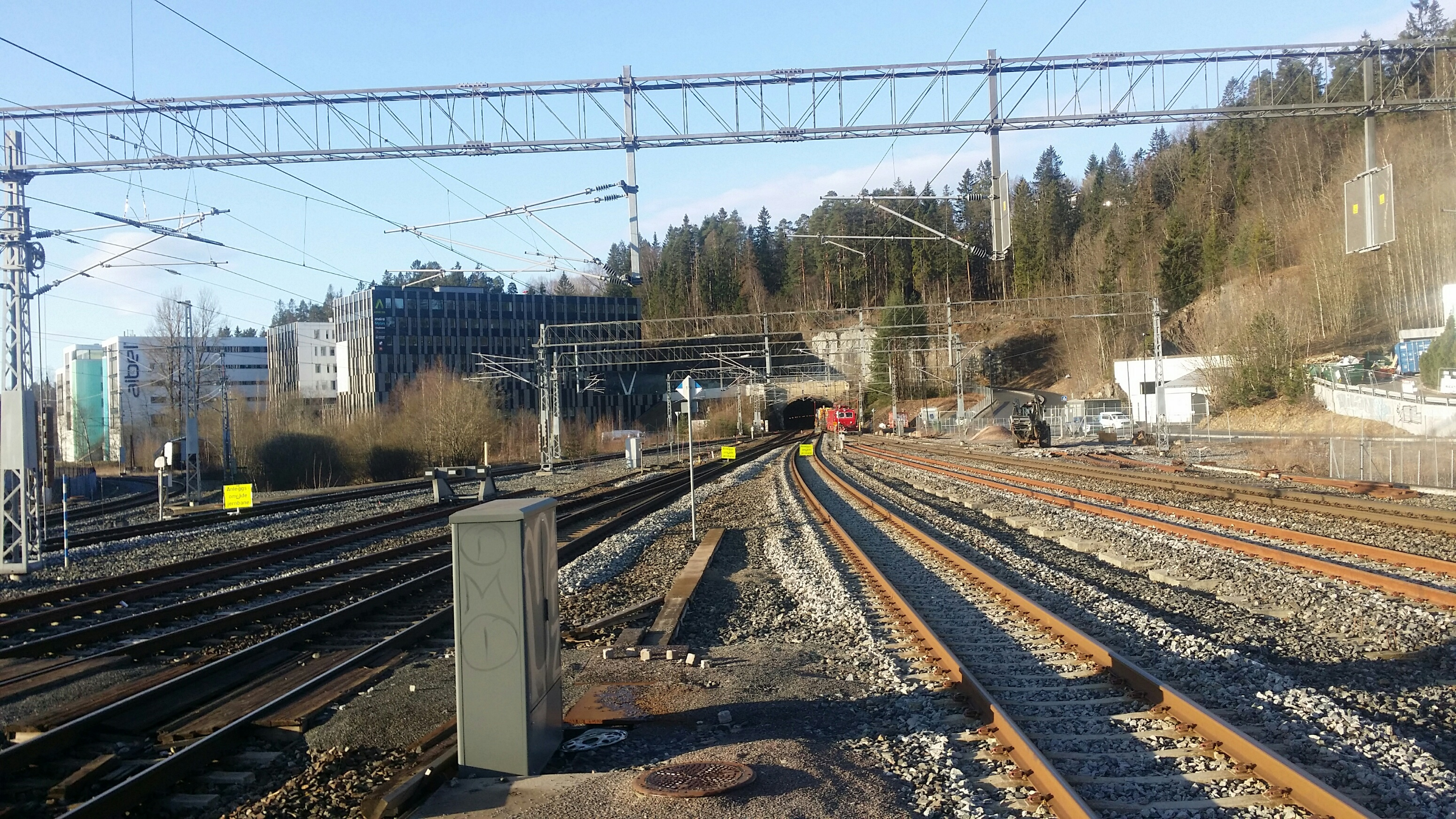 Tunnelåpningen på Asker-siden.